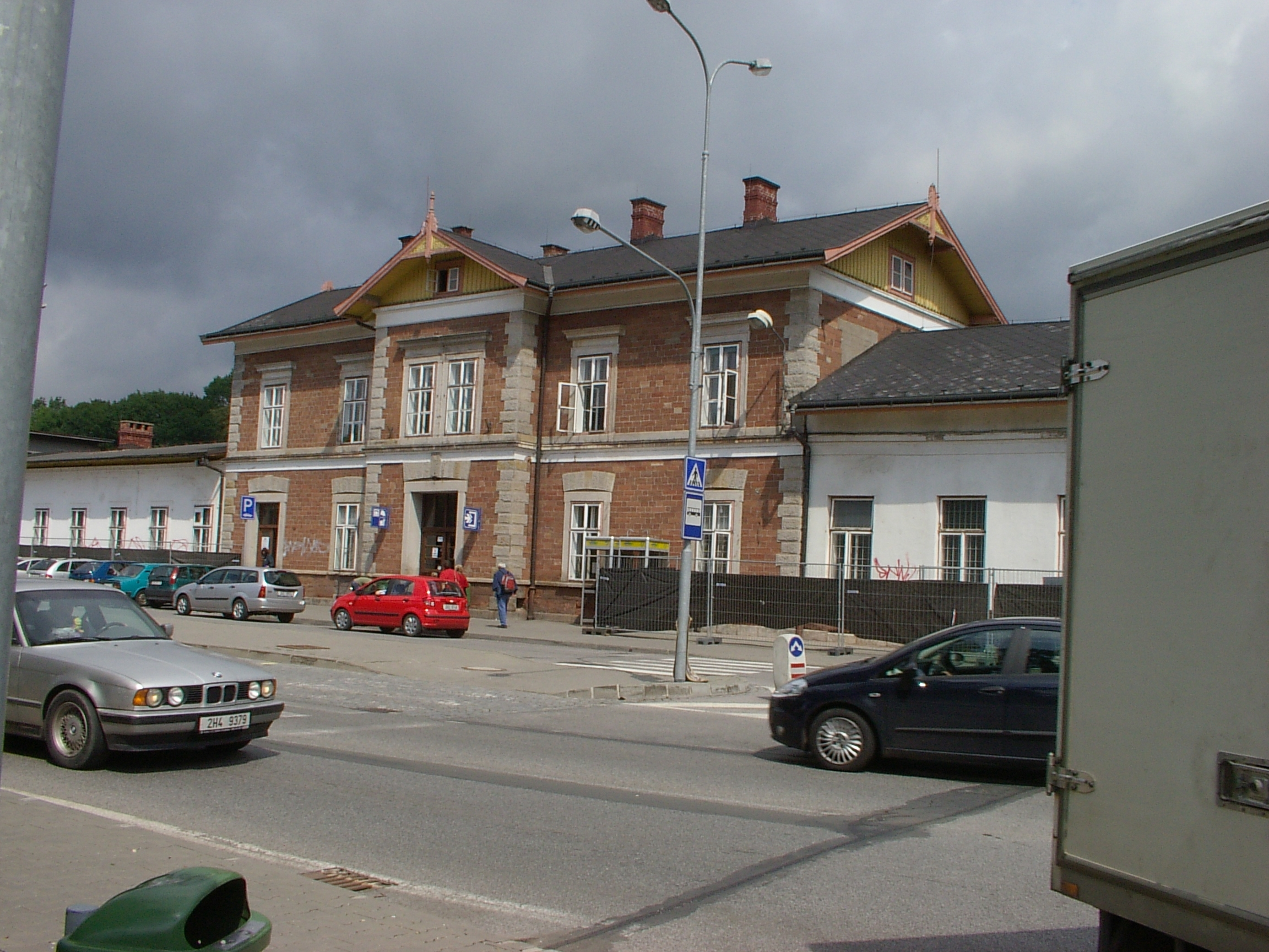 Trutnov Hlavni Nadrazi 2006